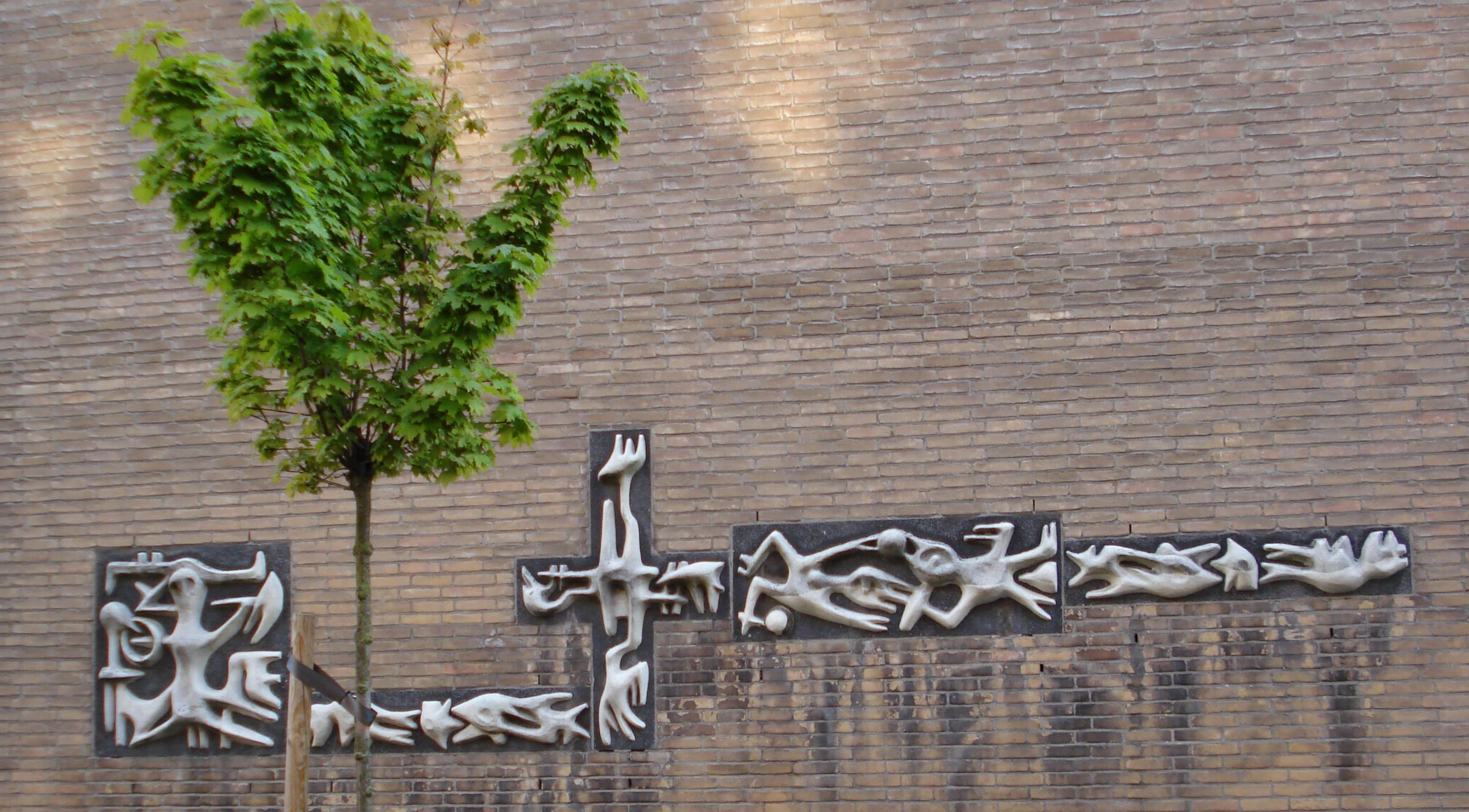 Rotterdam, Vredehofweg. Kunstwerk "Vogels en vissen" van Lotti van der Gaag. Rotterdam/The Netherlands.